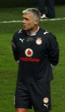 Chelsea (3) v (0) Olympiakos